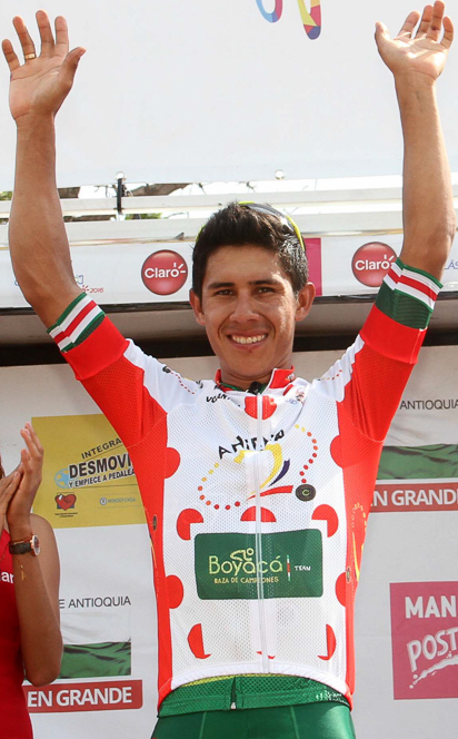 Et.8 Clásico RCN 2016 Javier Gómez en el podio.